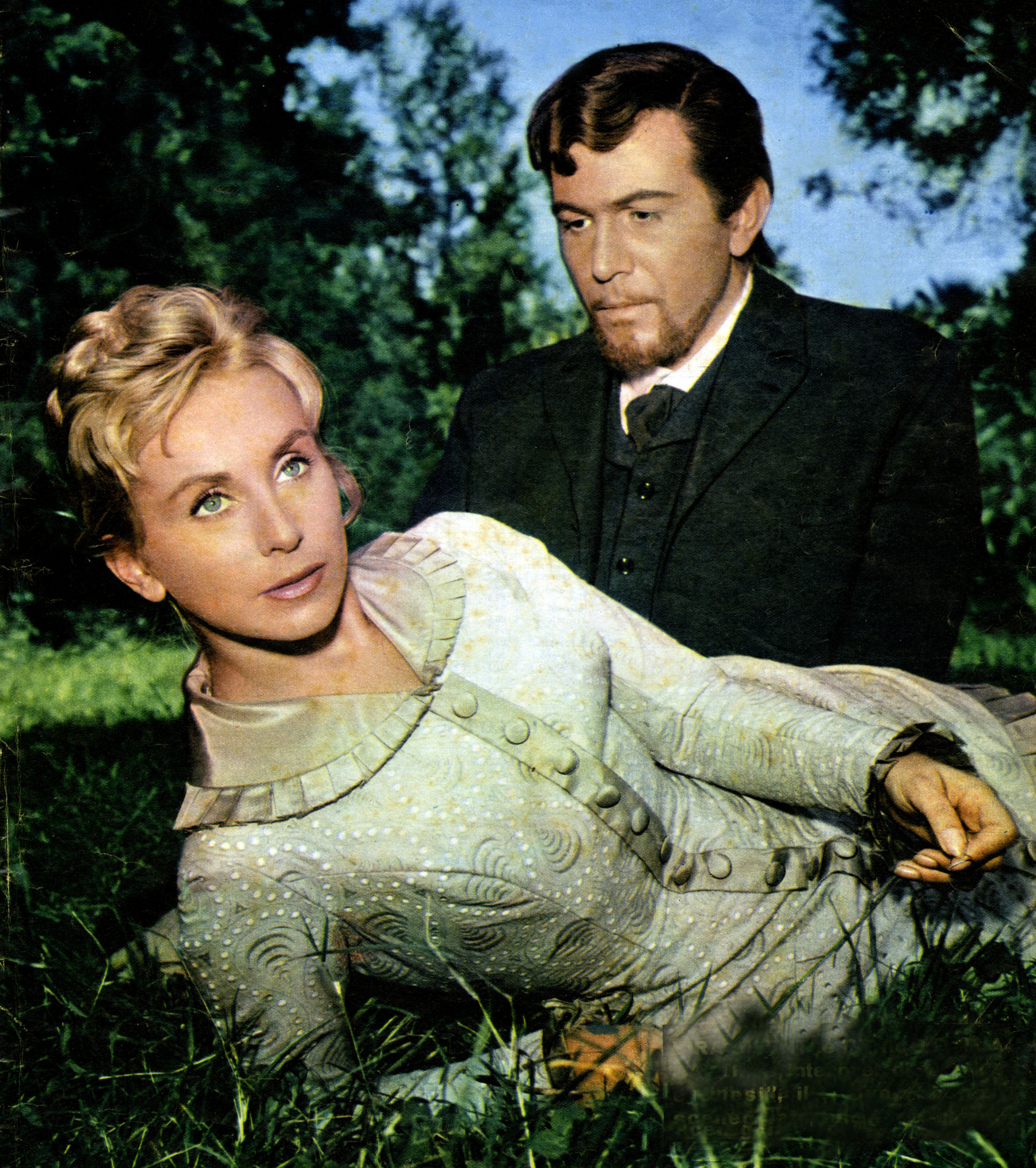 Photo from magazine Radiocorriere (1958) - Vira Silenti ed Enrico Maria Salerno nello sceneggiato Umiliati e offesi RAI 1958.